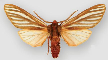 Pseudohemihyalea ptosi male